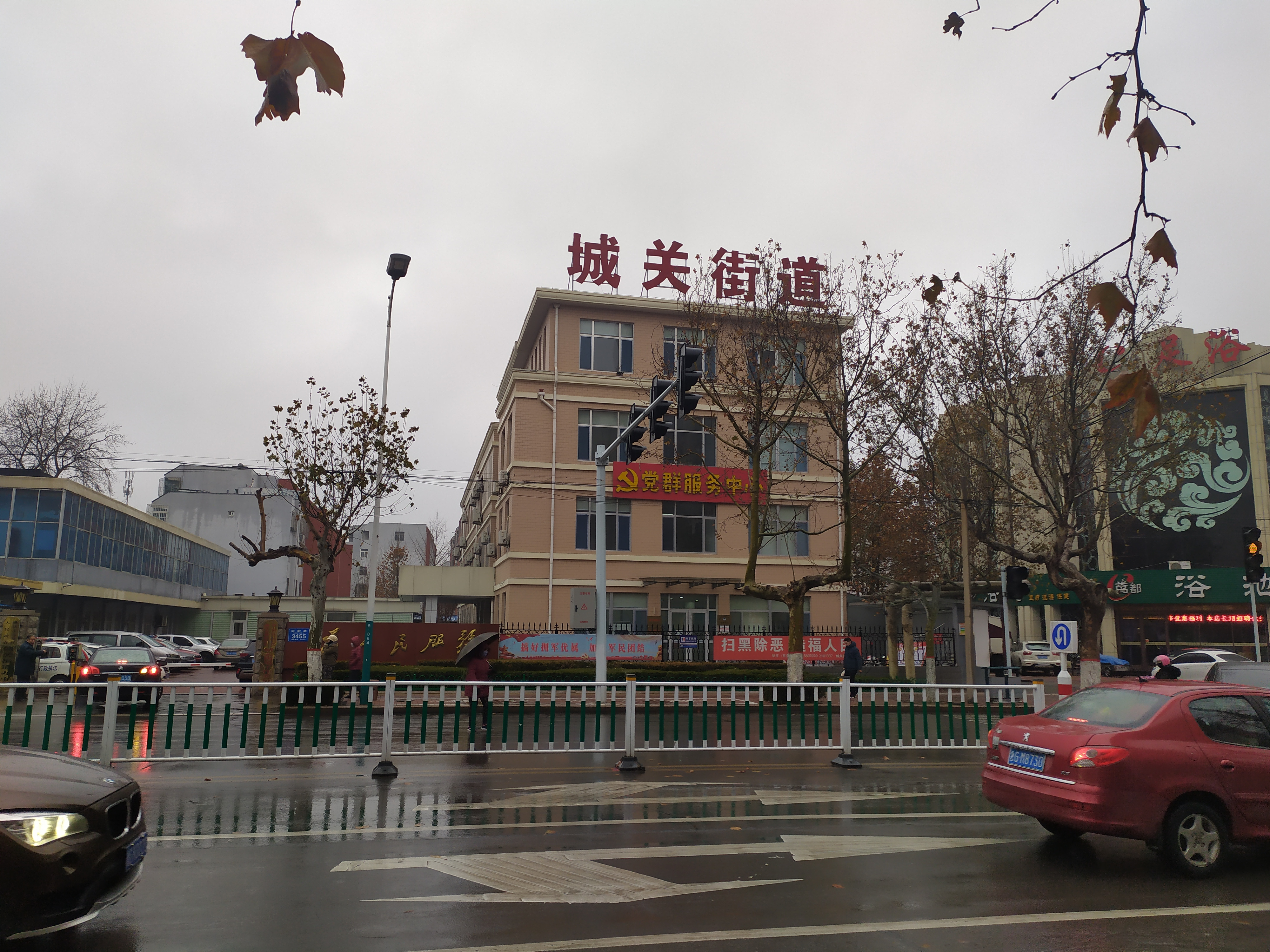 中文（中国大陆）: 城关街道党群服务中心